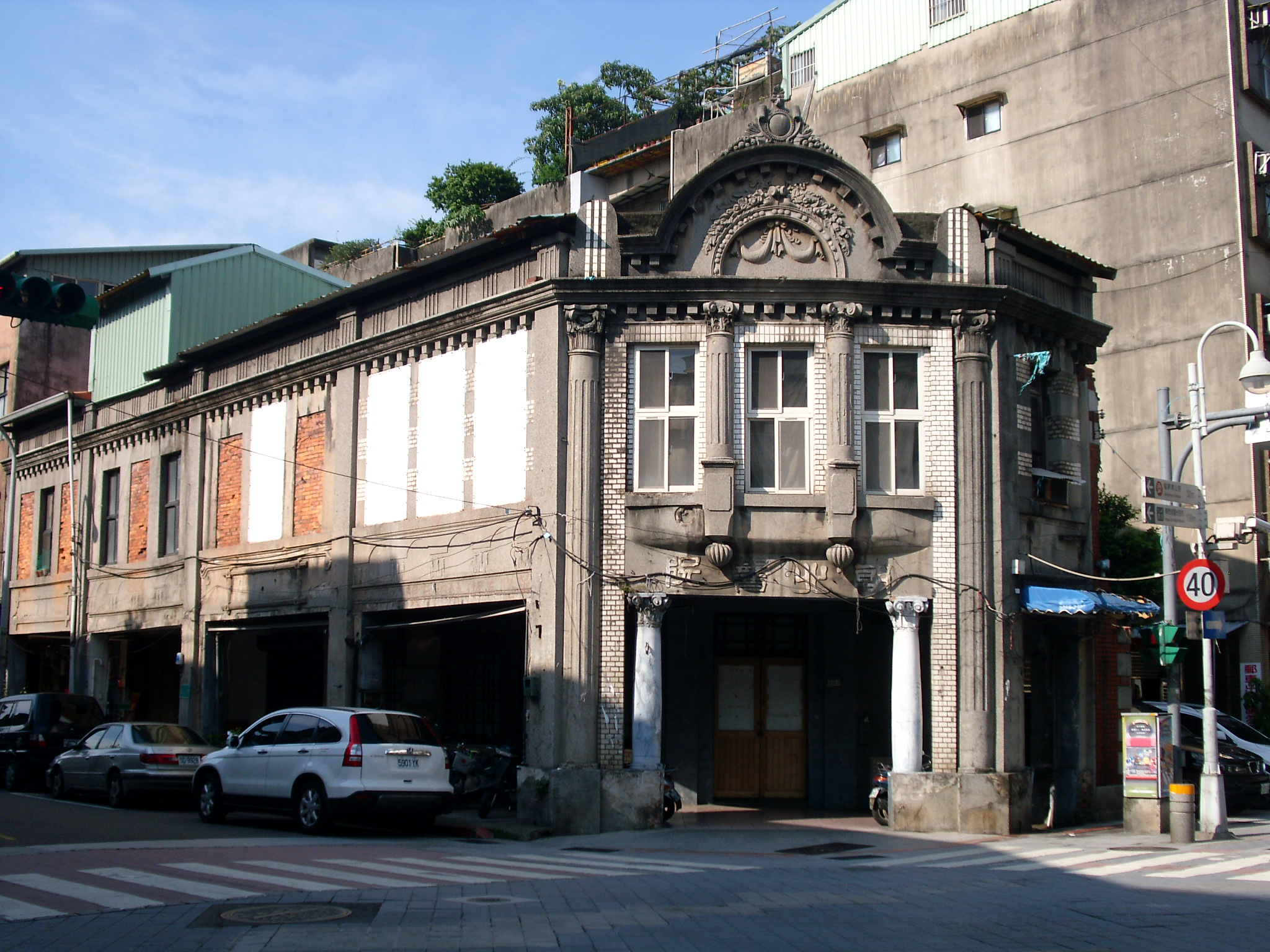 Bân-lâm-gú: 朝北醫院，佇臺北艋舺貴陽街佮西園路交叉路口，地址算是貴陽街這爿。